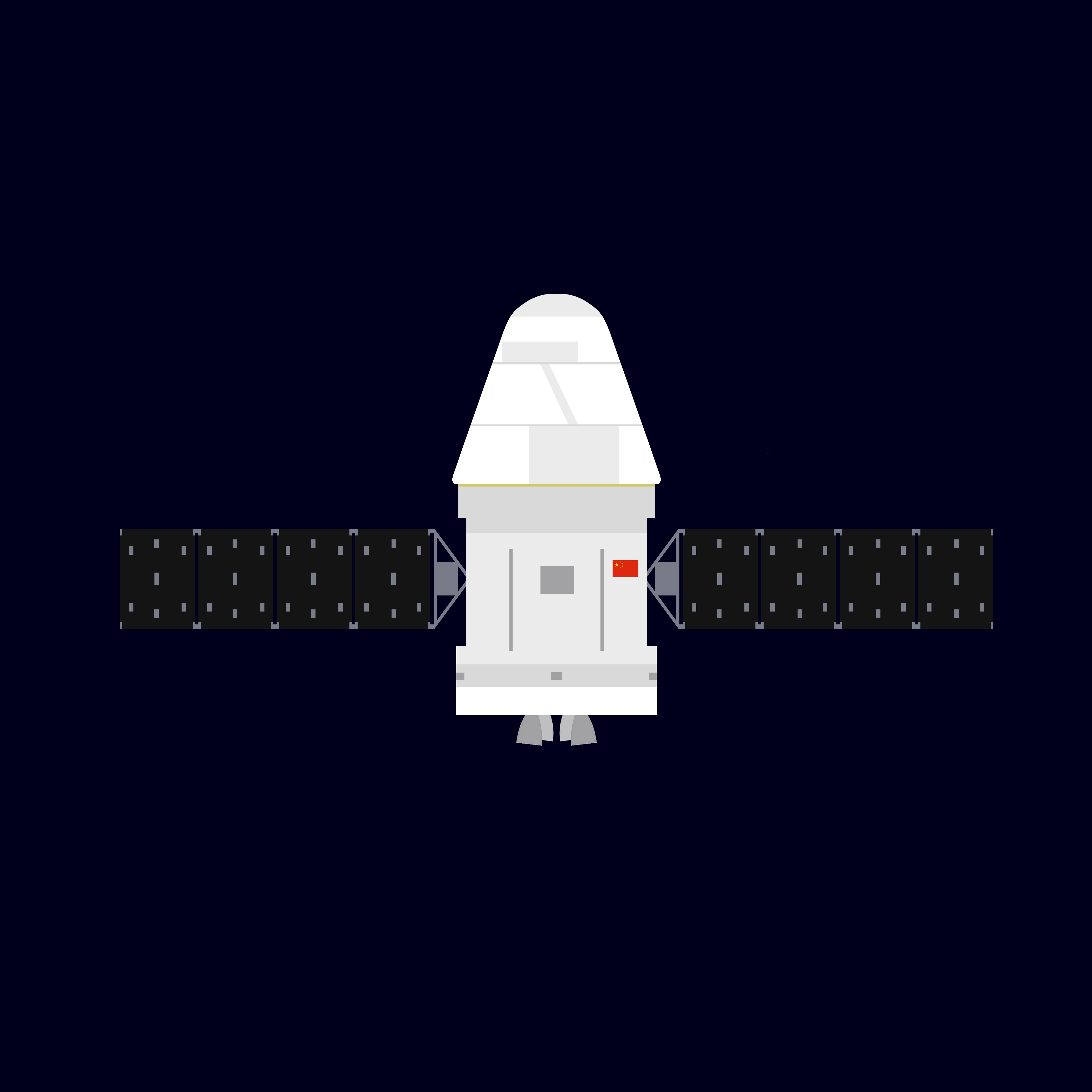 New crewed Chinese spacecraft that made its first flight in May 2020 on the first CZ-5B